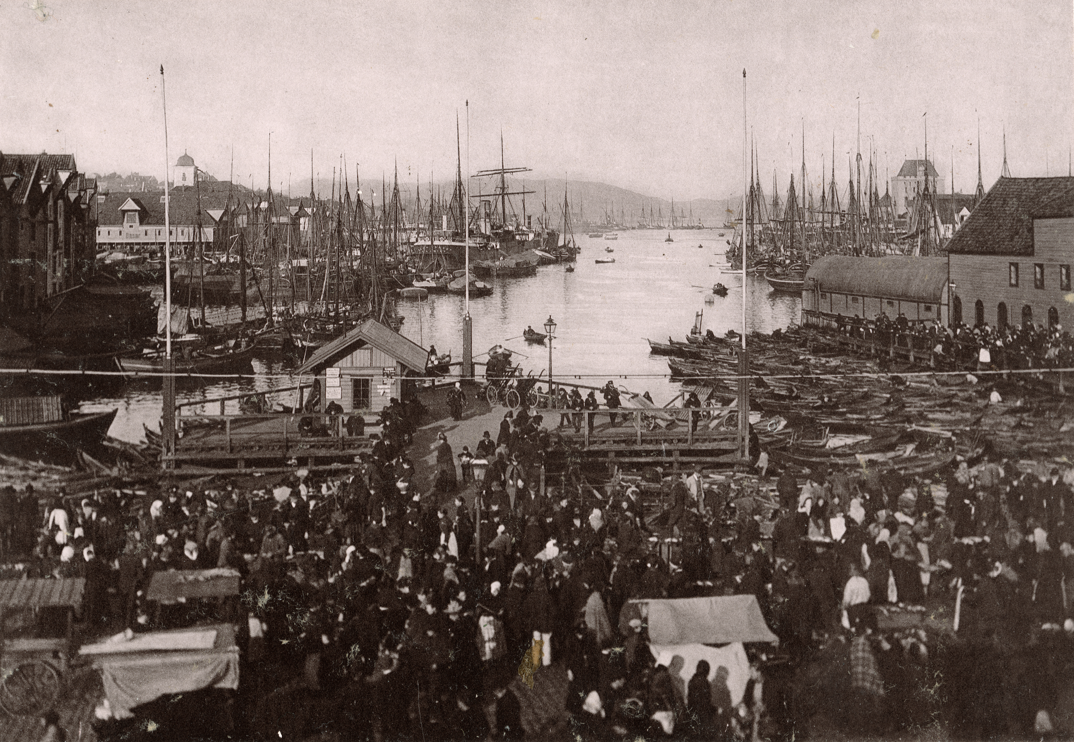 Vågen i Bergen, Hordaland This image on crowdsourcing geotagging platform Fotodugnad